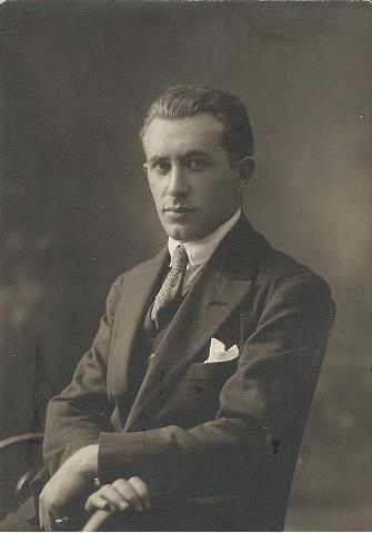 El matemático, profesor y político José del Corral Herrero (1890-1970).